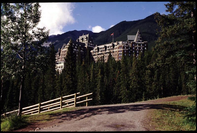 Banff Springs Hotel, Alberta班芙温泉酒店